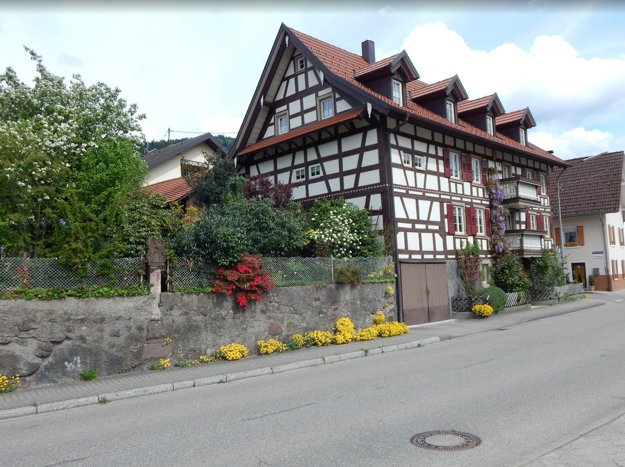 Kappelrodeck, Germany